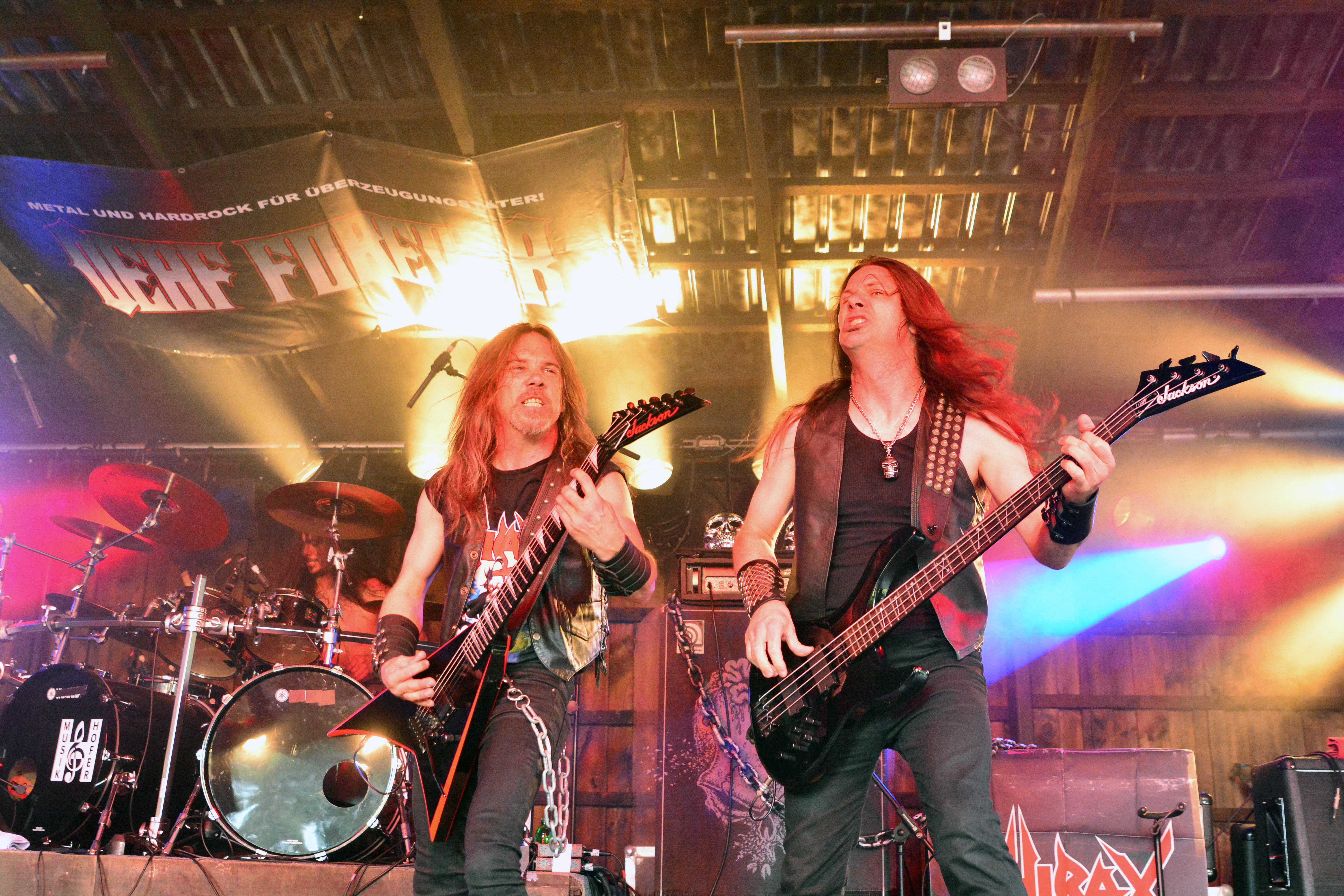 Hirax beim Headbangers Open Air 2015